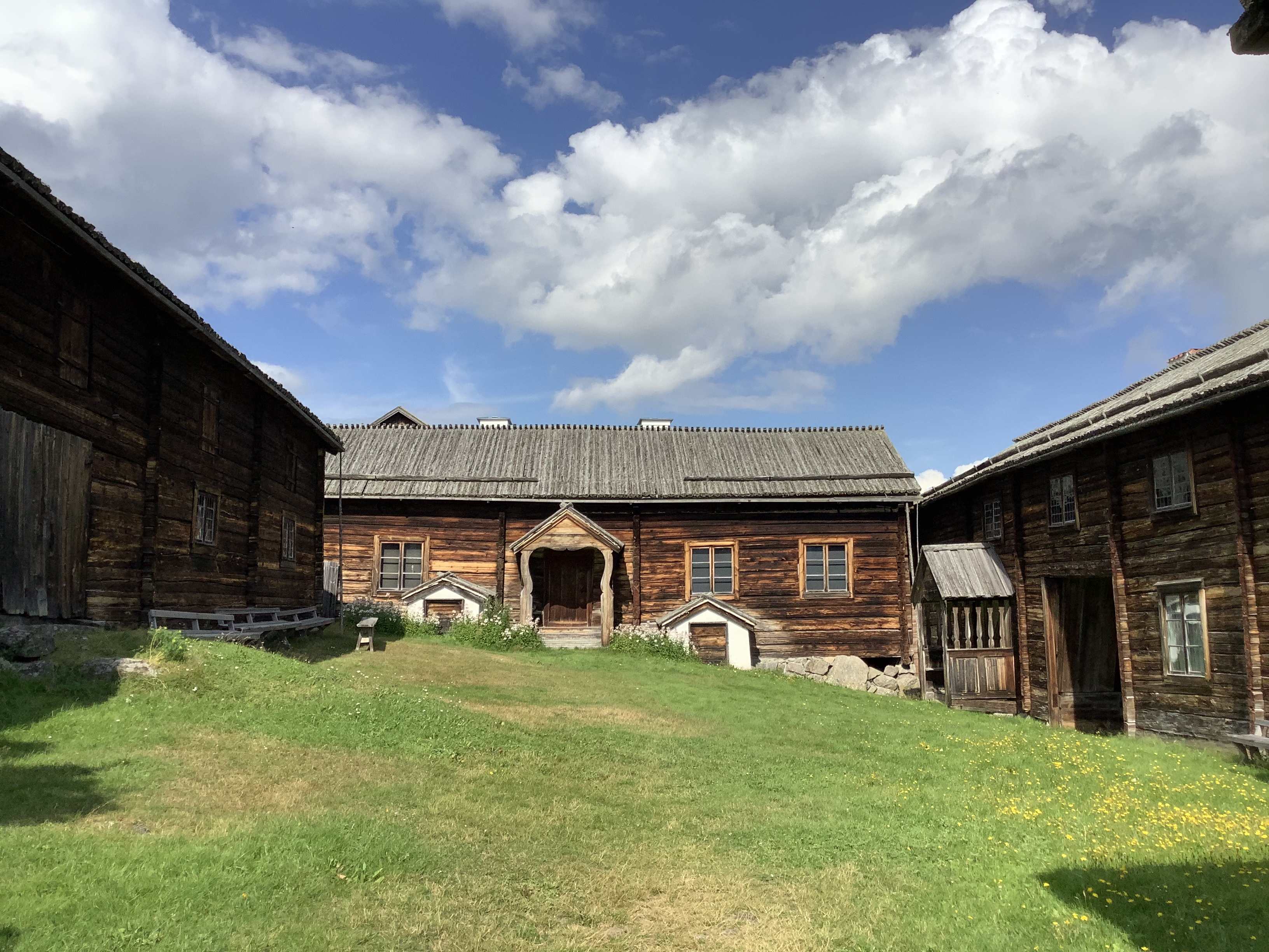 Karlsgården, också kallad Karls i Bondarv, en hälsingegård 3-4 kilometer söder om Järvsö. Från vänster till höger byggnaderna "Väst på gården", "Norr på gården" (herrstugan) och "Öst på gården".